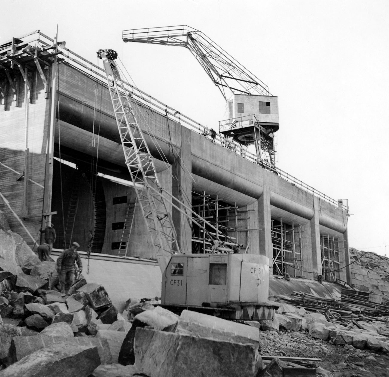 Будівництво гідроелектростанції Харспронгет на річці Лулеельвен, Швеція. DIG3334 Harsprångets kraftstation. Intagsbyggnaden är snart färdig. Det som pågår på bilden är "stensätteriarbete". Harsprångets Powerplant, Jockmock, Sweden. Photo: Okänd/ Unknown, 1945-1952